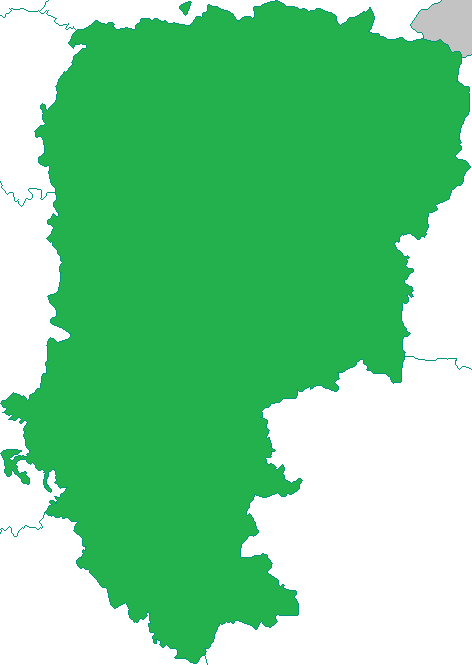 Limite départementale de l'Aisne entre 1790 et 1799